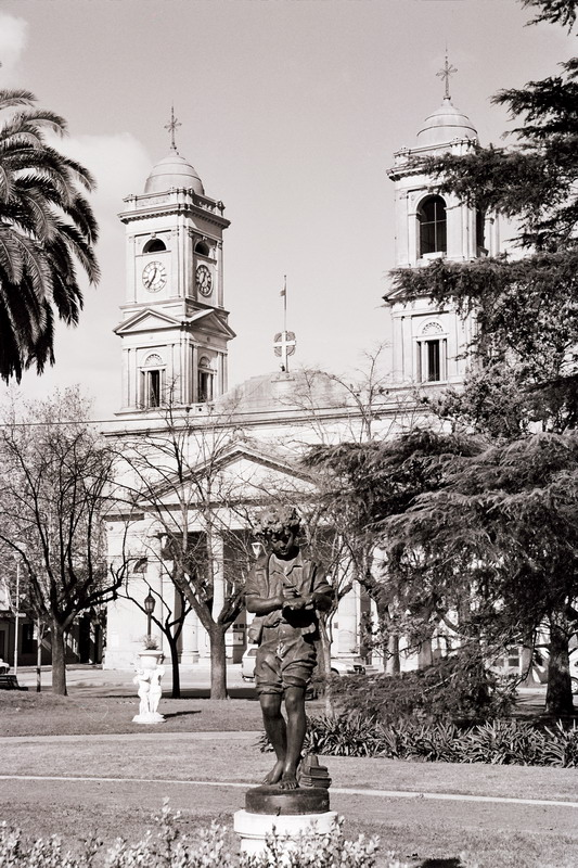 Parroquia Santa Rosa de Lima Bragado, Buenos Aires Fotografo: Juan Azcurra